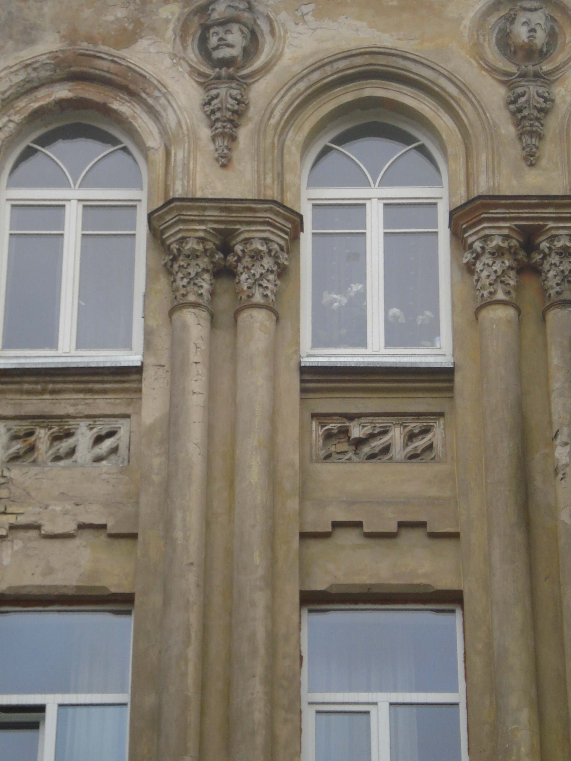 Jono Basanavičiaus gatvė 16 in Vilnius. Detail